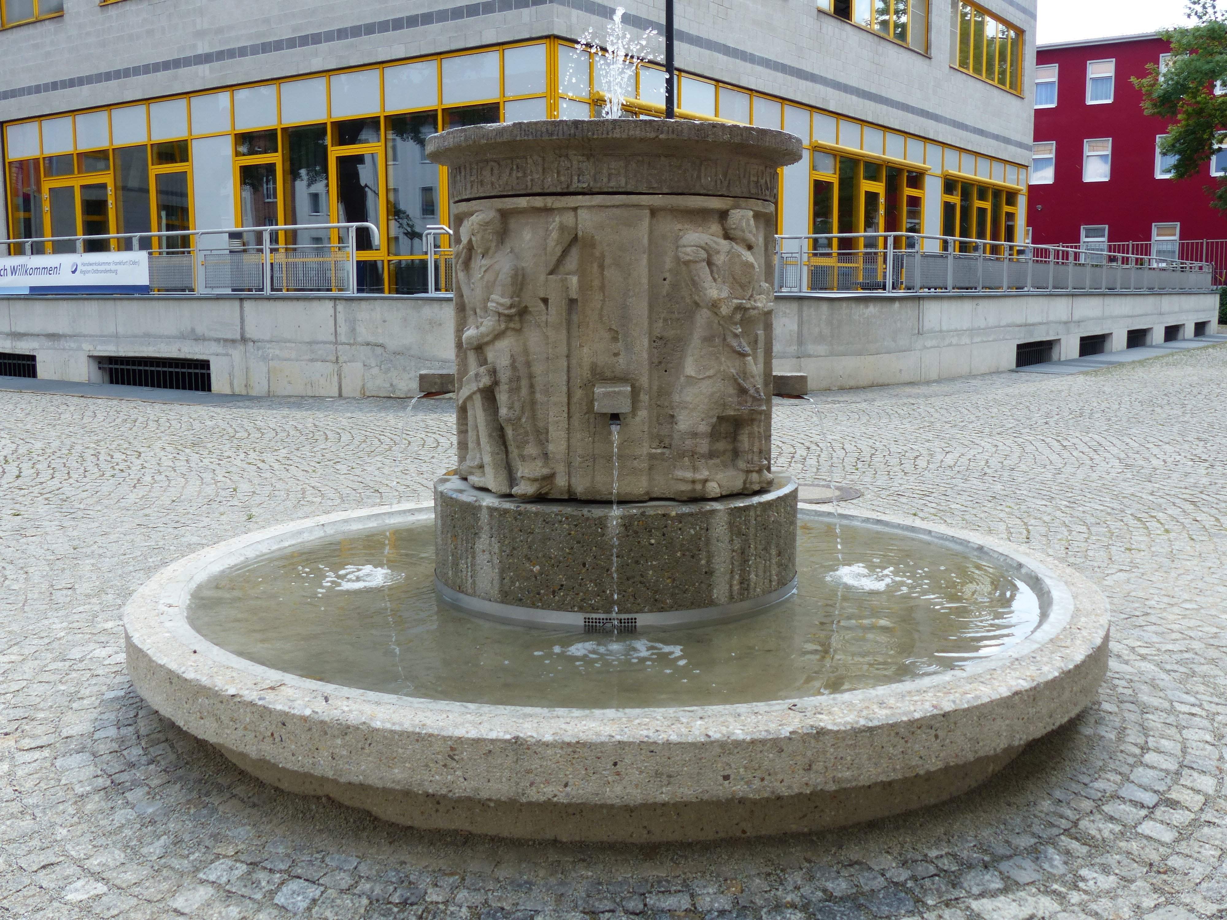 Handwerkerbrunnen in Frankfurt (Oder) 2020